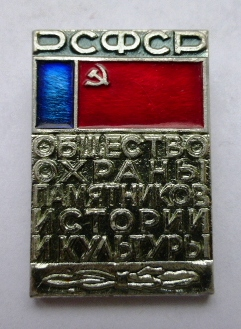 Нагрудный знак члена Российского общества охраны памятников.